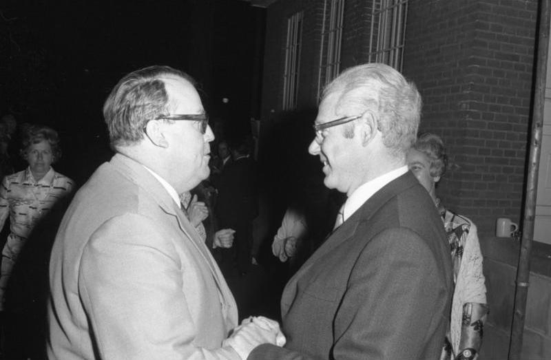 Fest in der Landesvertretung Berlin "Berliner Laubenpiper"